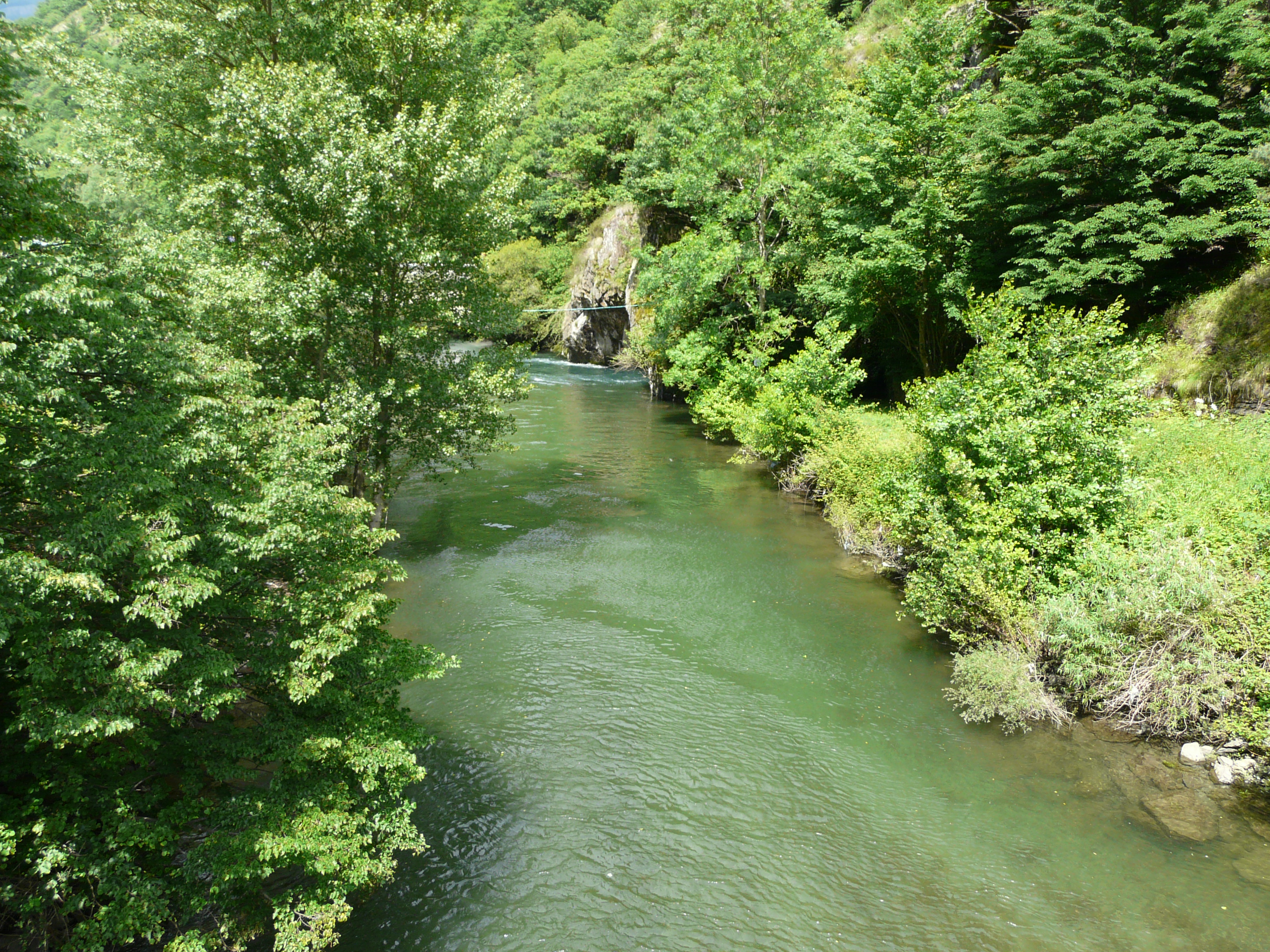 La Garonne en aval du pont situé face à la centrale hydroélectrique de "Pont de Rei", Bausen (à gauche) et Canejan (à droite), Val d'Aran, Espagne.